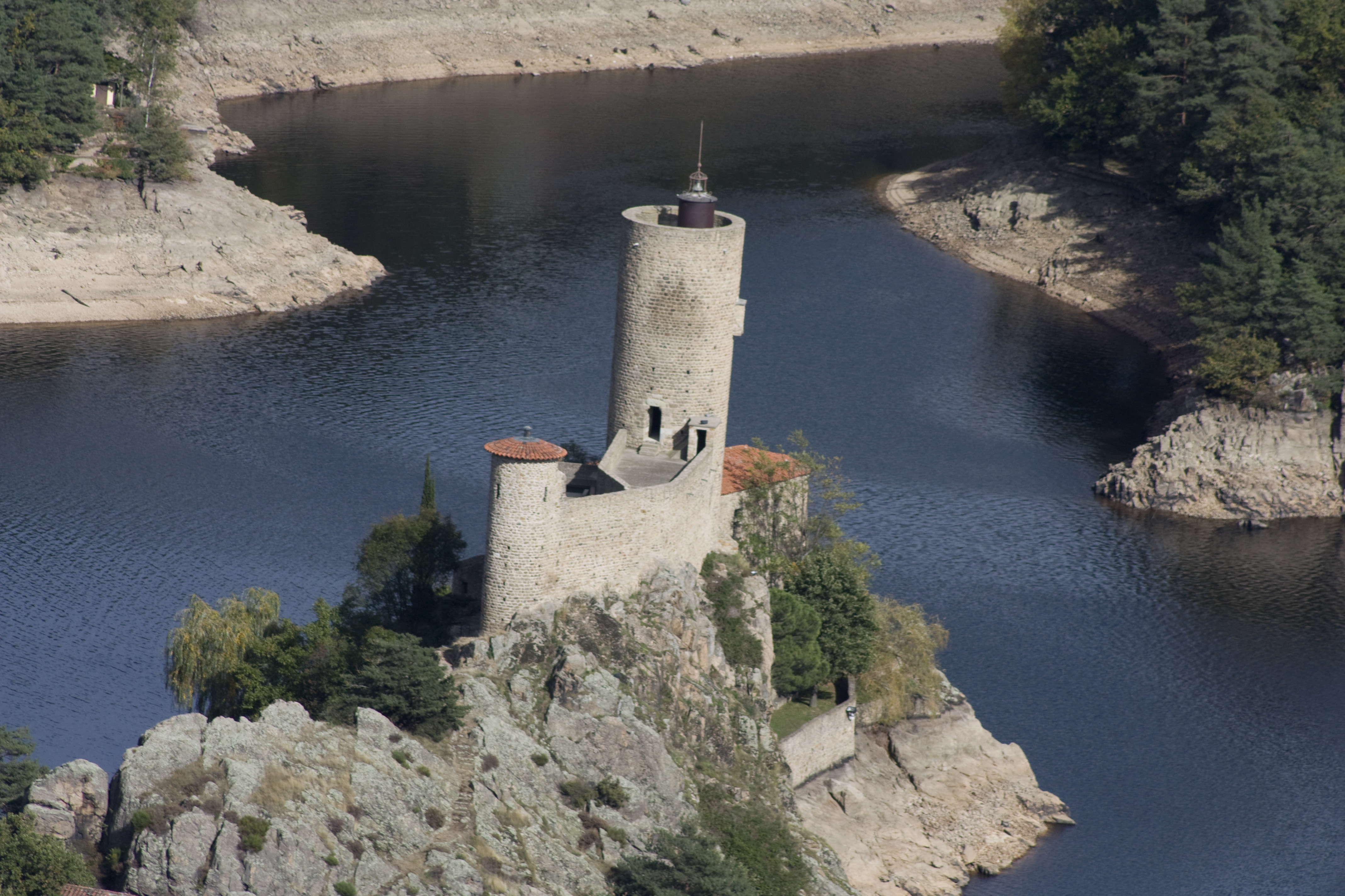 La façade nord rst tournée vars la plaine du Forez